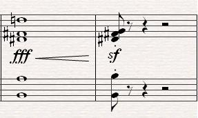 Acordes que representan el amor del príncipe en El príncipe de madera de Béla Bartók